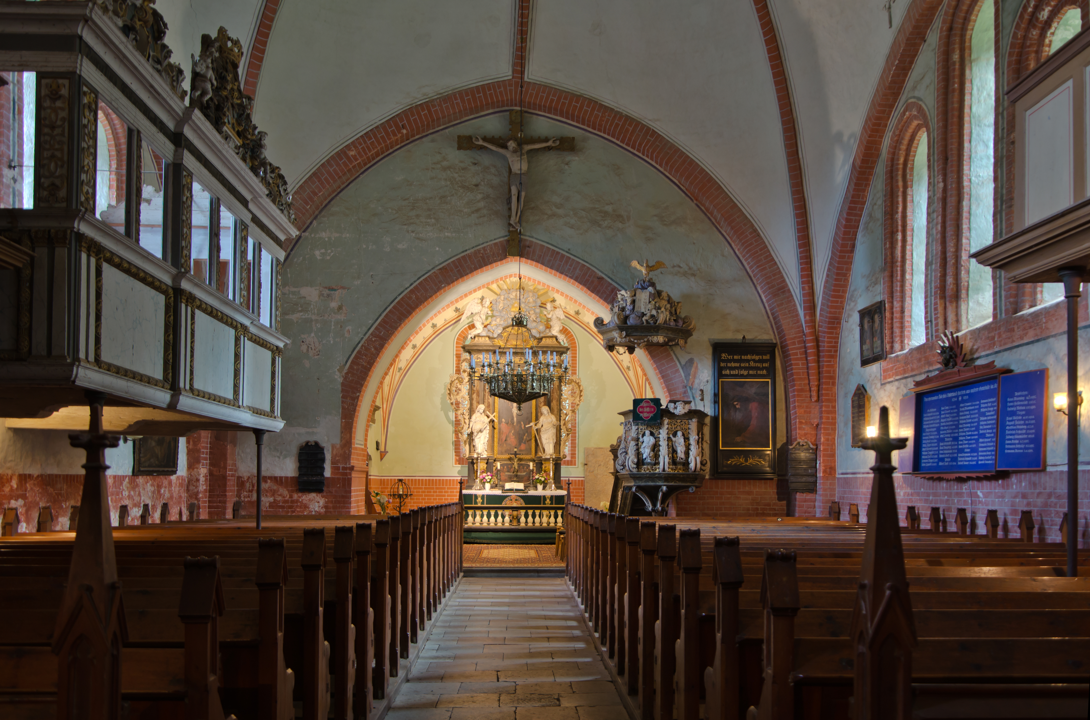 Neukirchen, Kirche, Blick nach Osten